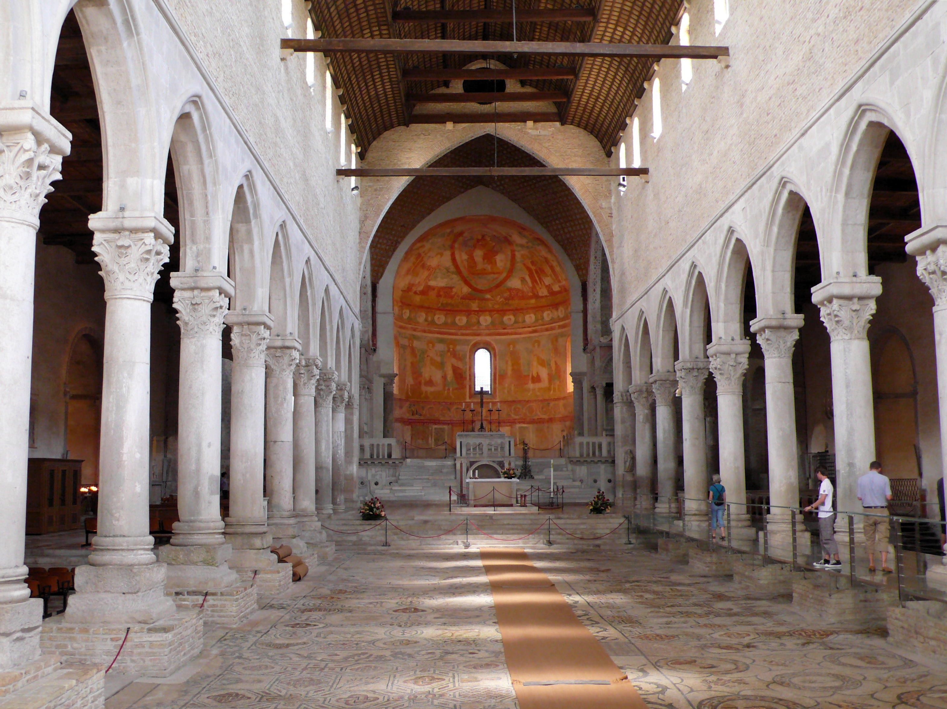 Dom von Aquileia, Inneres